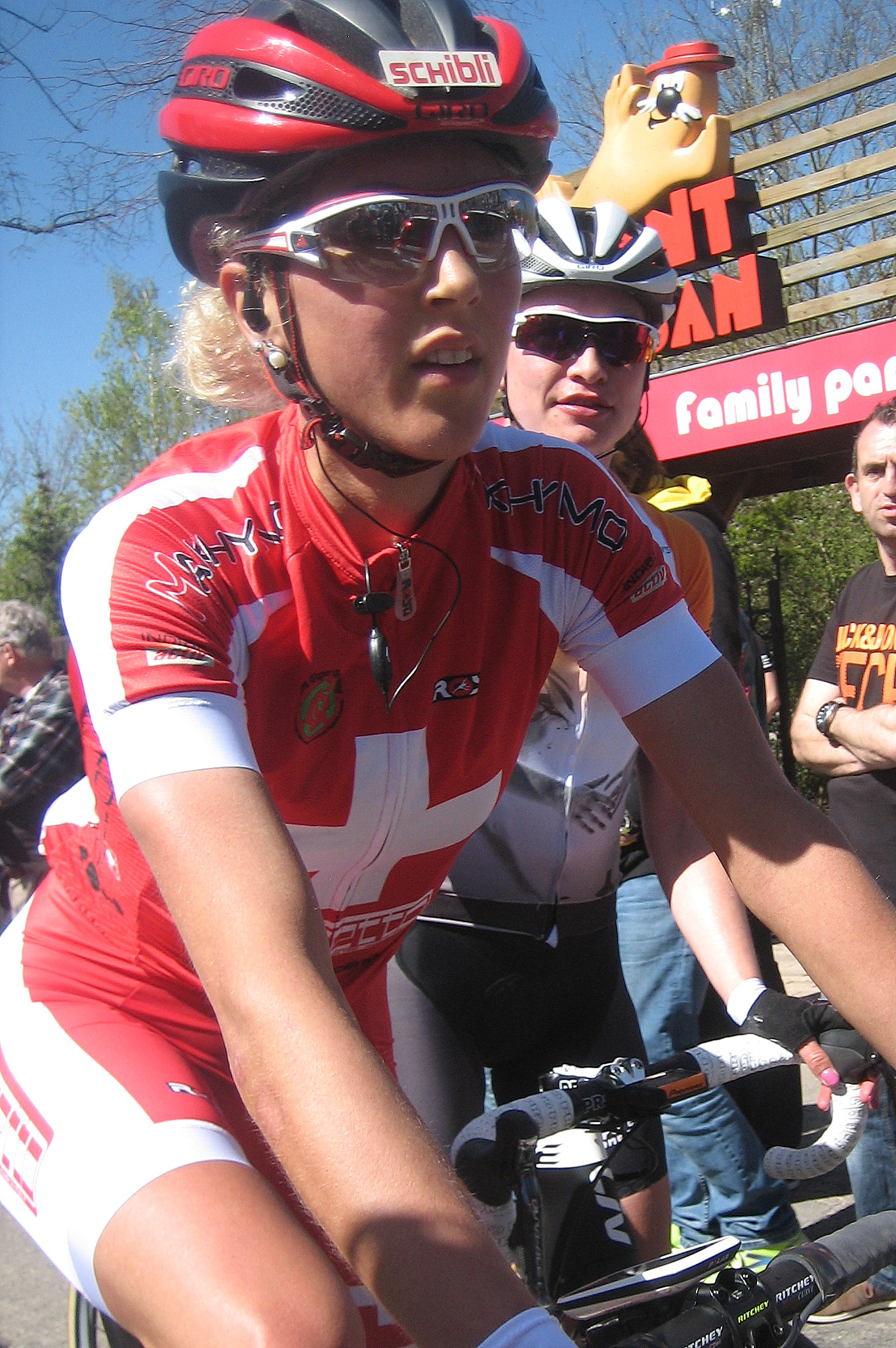 Jolanda Neff (Servetto Footon) na finish Waalse Pijl 2016